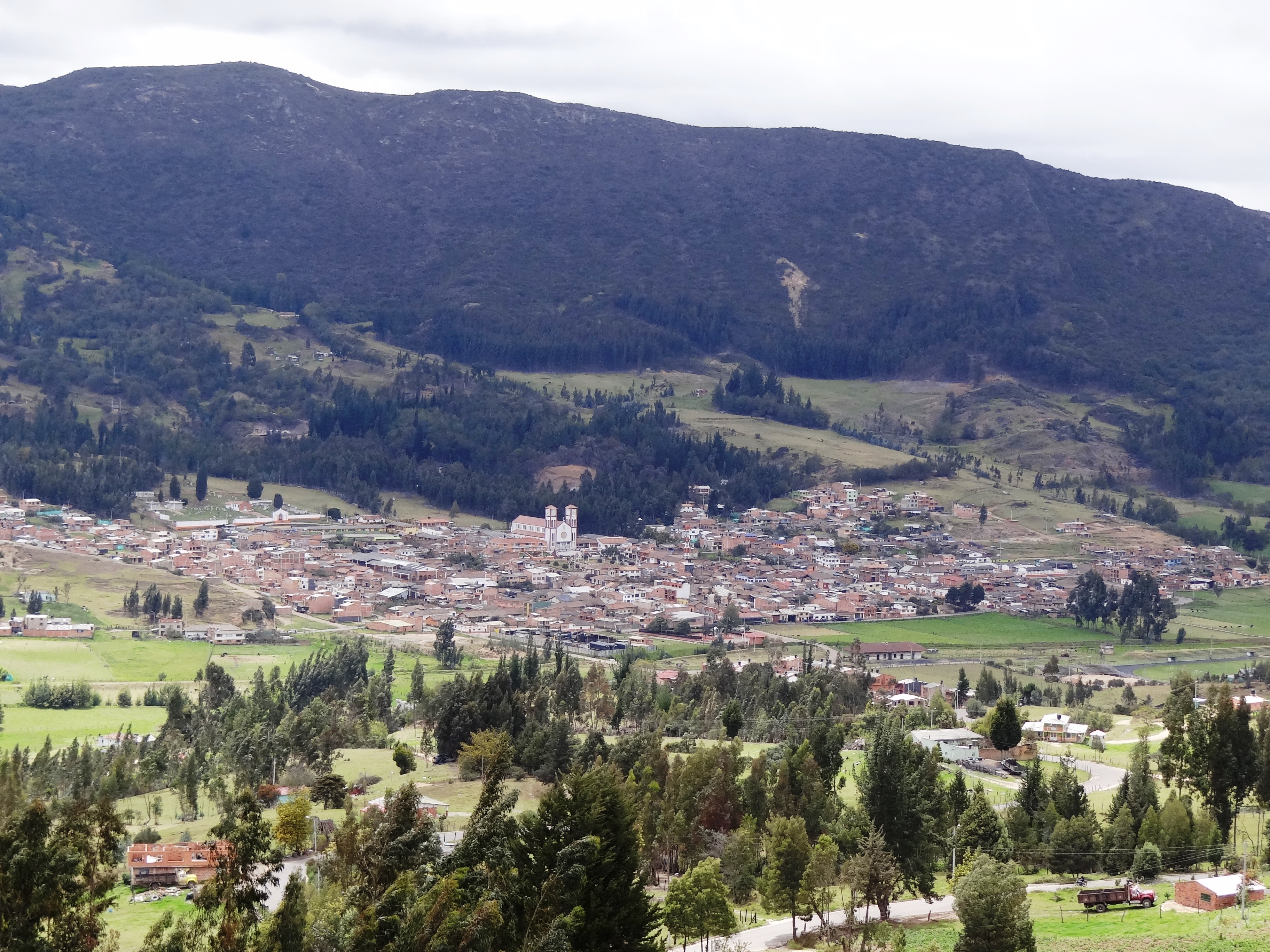 Área urbana del municipio de Lenguazaque, departamento de Cundinamarca, Colombia.